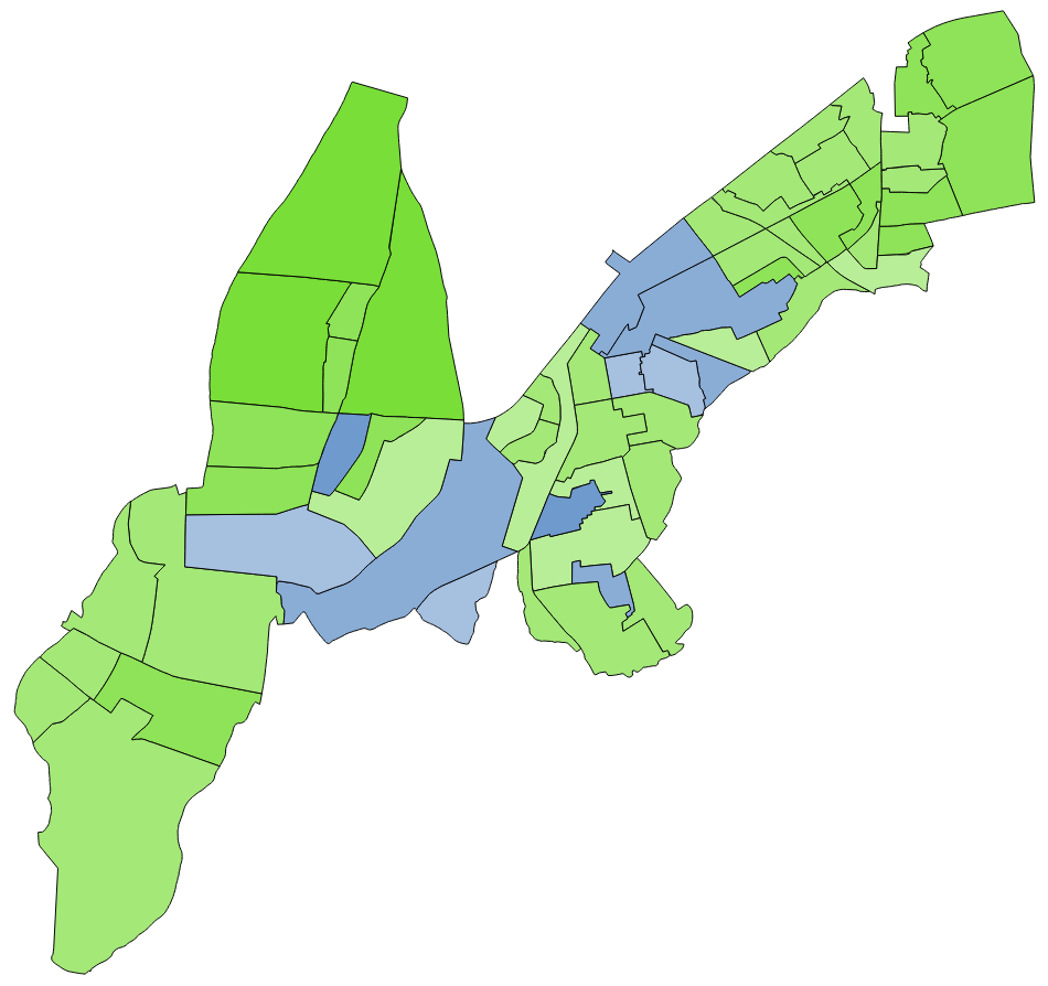 顏色對照表